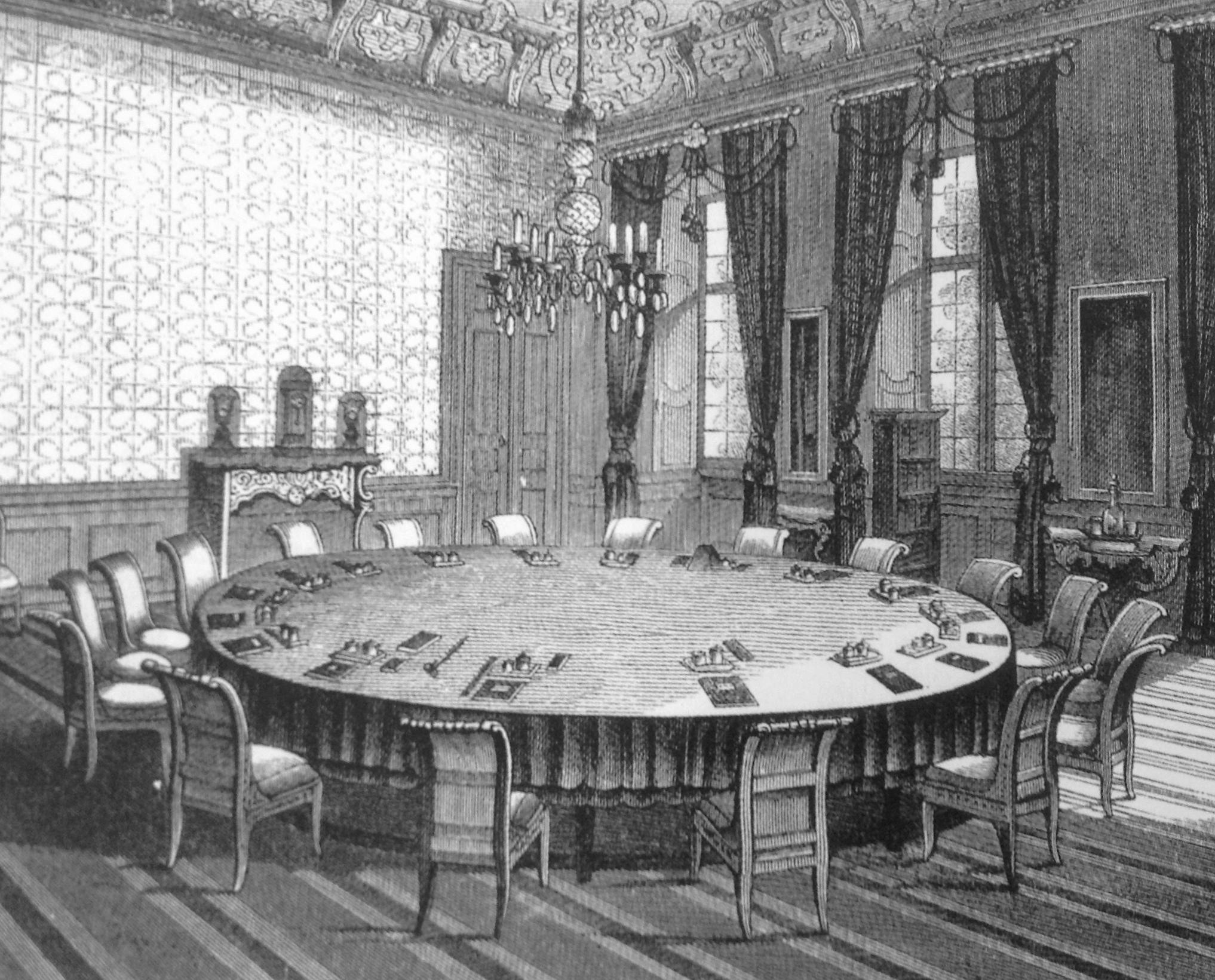 Sitzungssaal Engerer Rat Bundesversammlung.